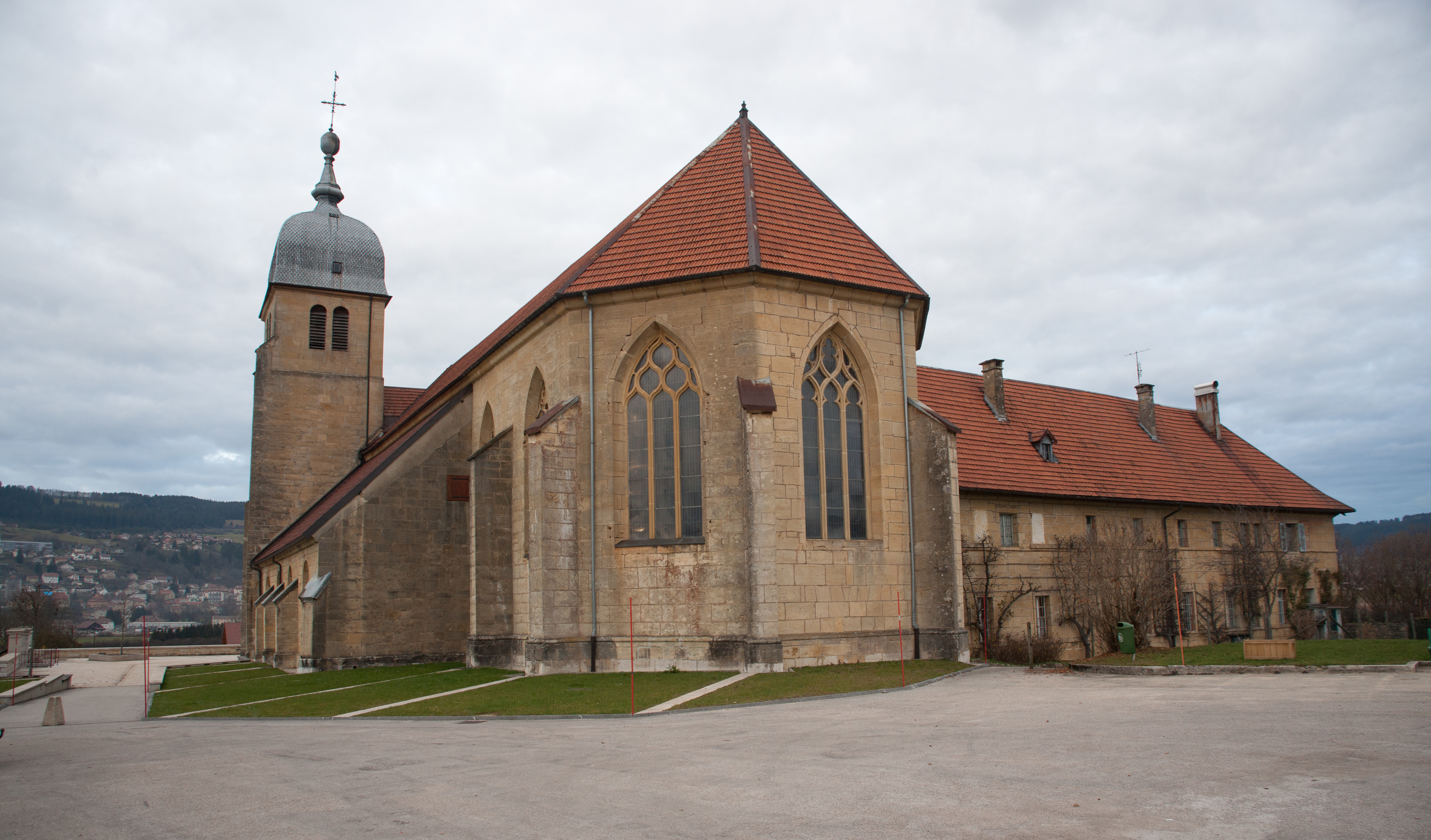 Couvent des Minimes de la Seigne